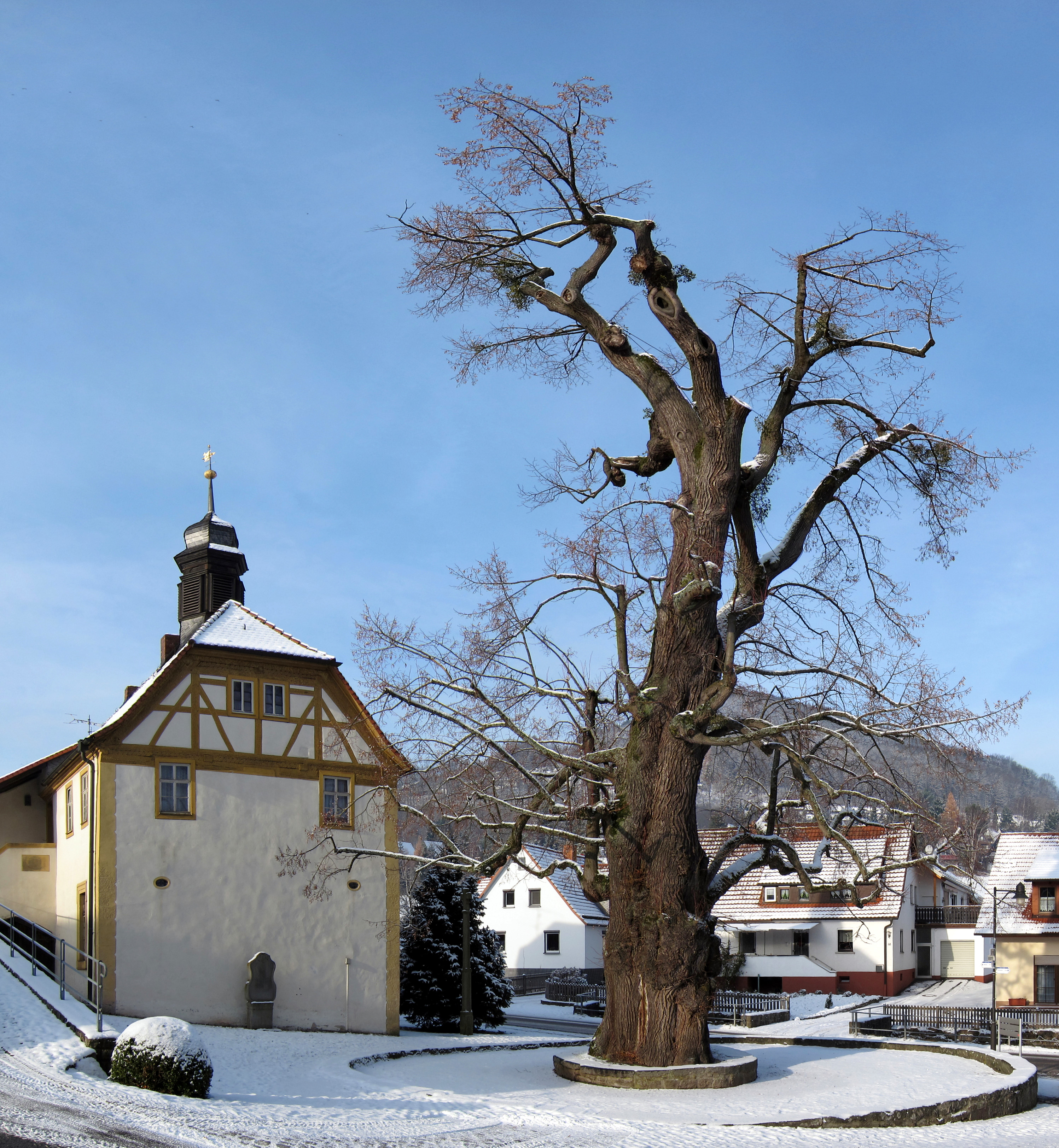 Die Dorflinde steht in Haselbach, einem Ortsteil von Bischofsheim an der Rhön im bayerischen Teil der Rhön. Die etwa 300 Jahre alte Winterlinde (Tilia cordata) ist als Naturdenkmal geschützt und bei der Unteren Naturschutzbehörde des Landkreises Rhön-Grabfeld mit der Nummer 504 und der Bezeichnung Dorflinde gelistet. Im Jahr 2010 hatte der Stamm einen Umfang von 7,3 Meter und eine Höhe von 25 Meter.